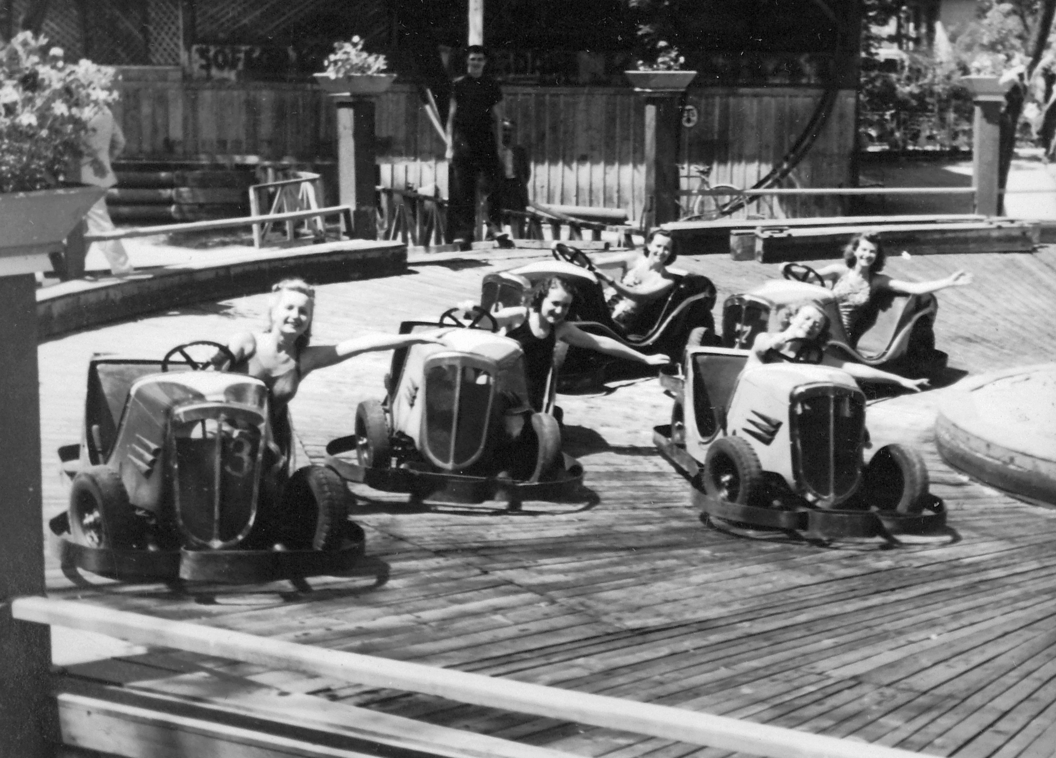 Versenyautó. Balra Szondy Biri színésznő. Location: Hungary, Budapest XIV. Tags: Budapest Title: Versenyautó. Balra Szondy Biri színésznő.